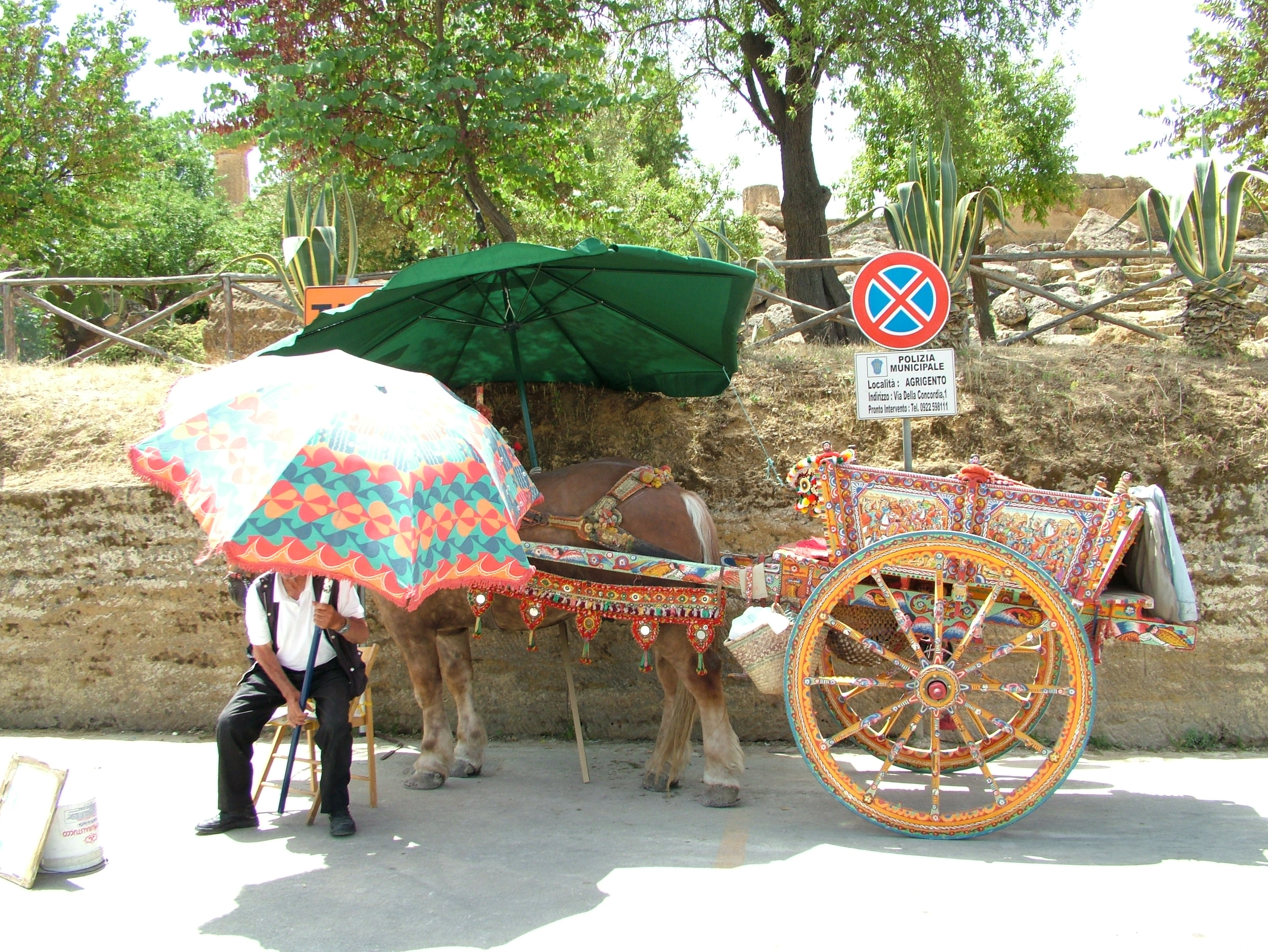 sizilianischer Karren in Agrigent, Sizilien. Der karren steht vor dem Eingang der Ausgrabungsstätten